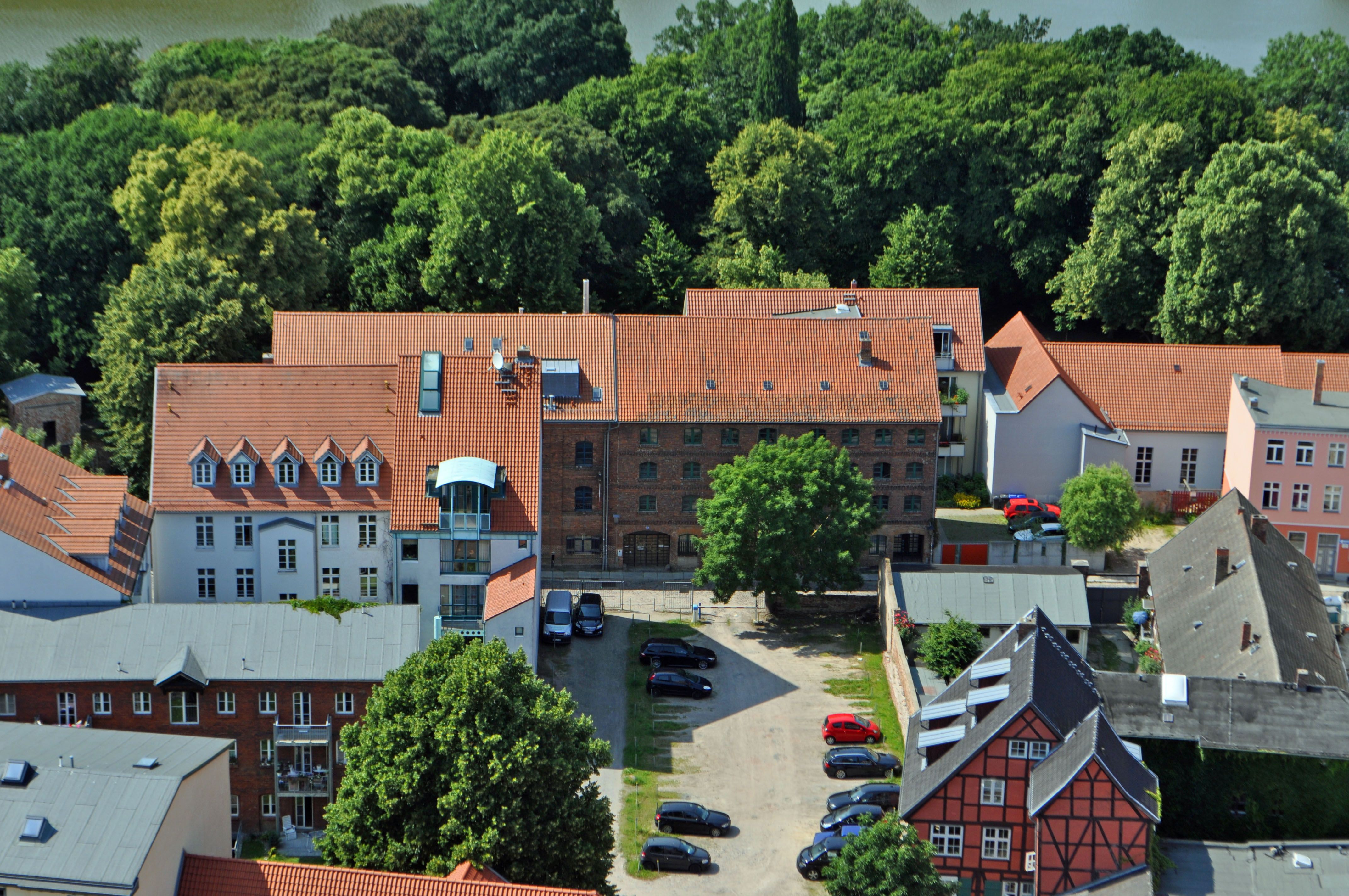 Fotografiert vom Turm der Marienkirche in Stralsund.